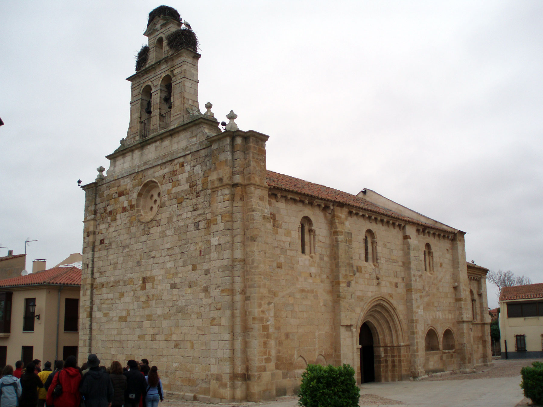 Iglesia de San Isidoro, en Zamora